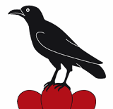 Flag of Untereggen, Canton of St. Gallen - Flago de Untereggen, Kantono de Sankt-Galo